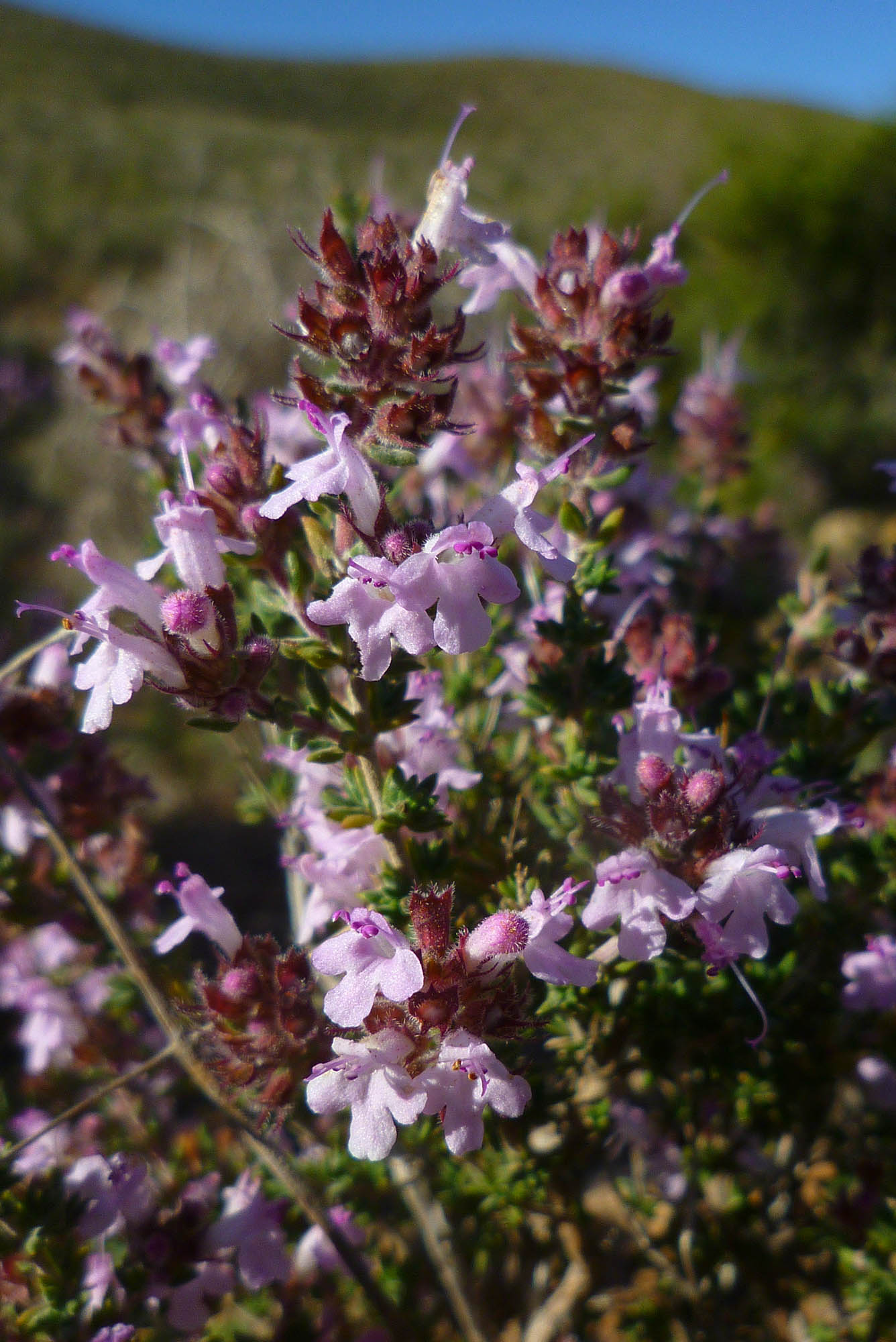 Thymus hiemalis en los montes de Cartagena en marzo de 2018.